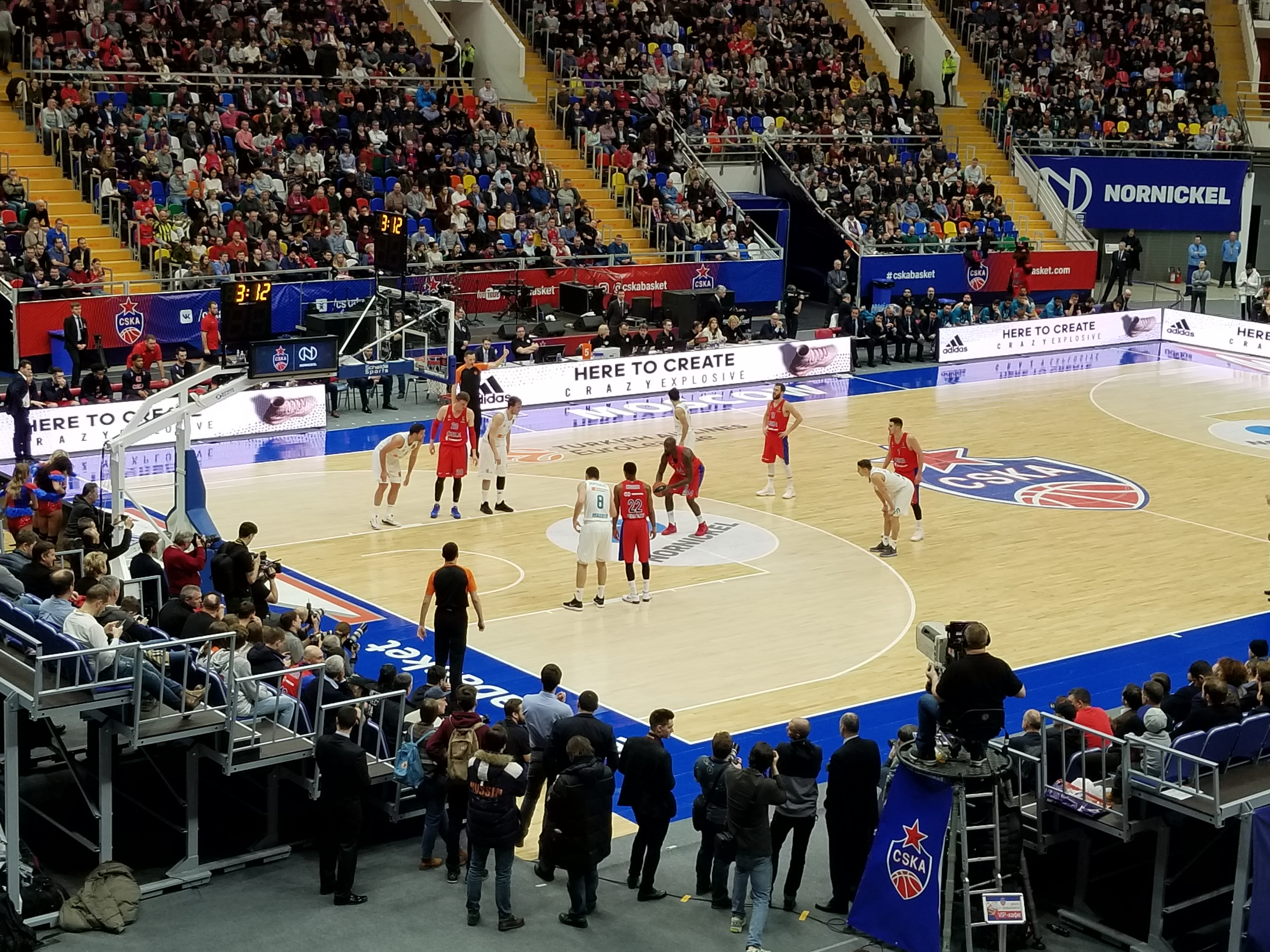 Матч ЦСКА – Реал Мадрид в ДС «Мегаспорт» 1 февраля 2018 года